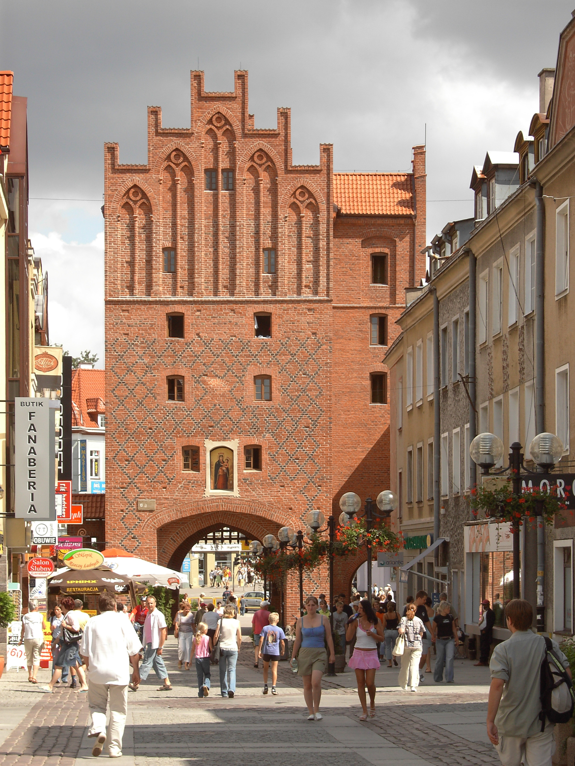 Stadttor von Olsztyn (Allenstein) von der Altstadt her gesehen Originalfotografie von Nol Aders am 02. August 2005 11:35